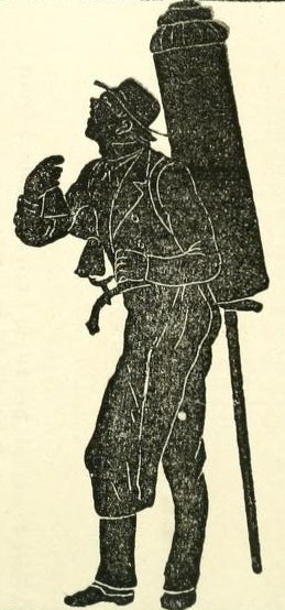 Dessin figurant un marchand de coco, extrait du livre Le théatre des ombres chinoises nouveau Séraphin des enfants, recueil de jolies pièces amusantes et faciles à monter., Le Bailly éditeur, Paris 1871.